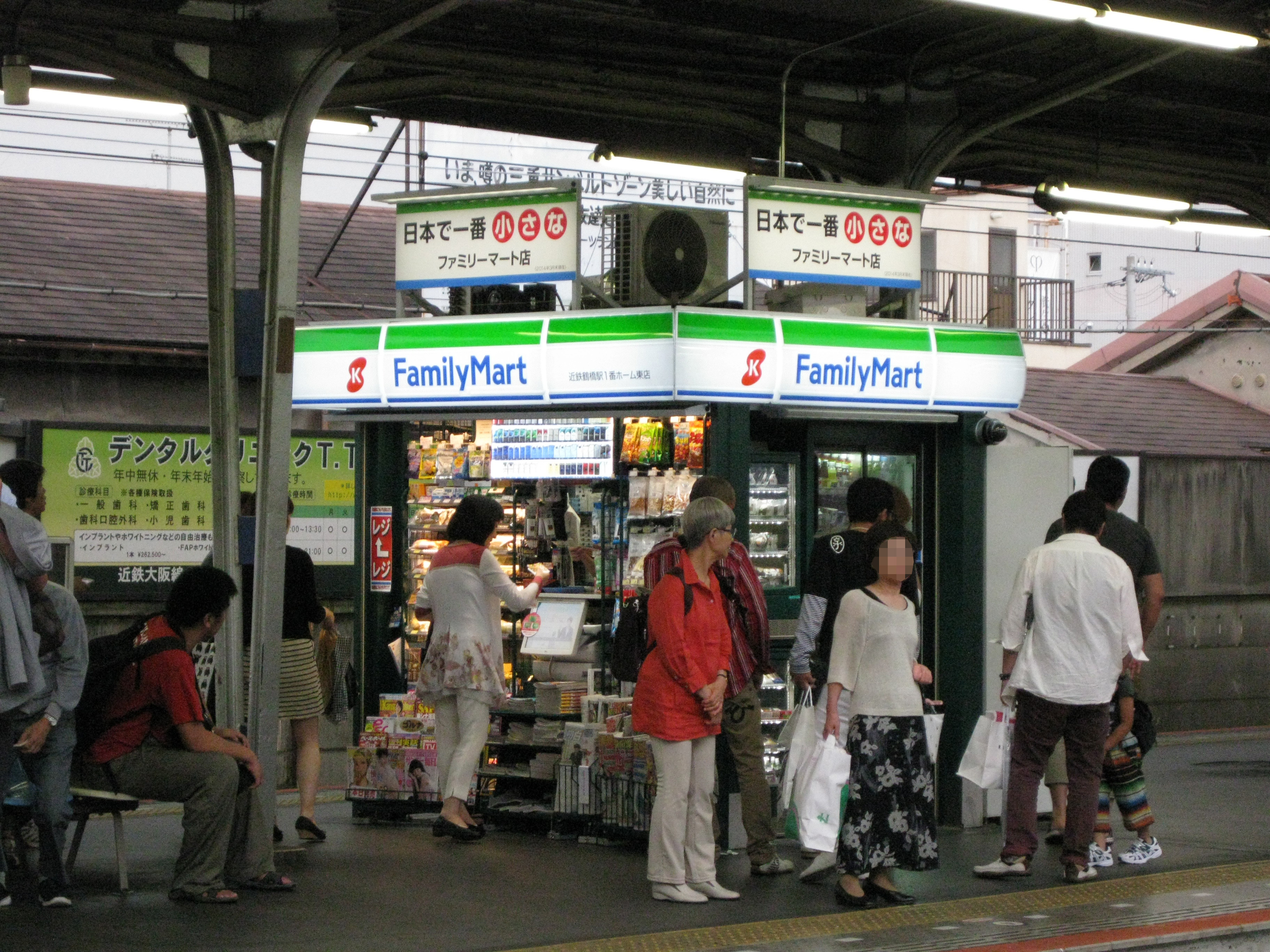 鶴橋駅奈良・伊勢方面プラットホームにある「日本一小さなファミリーマート」